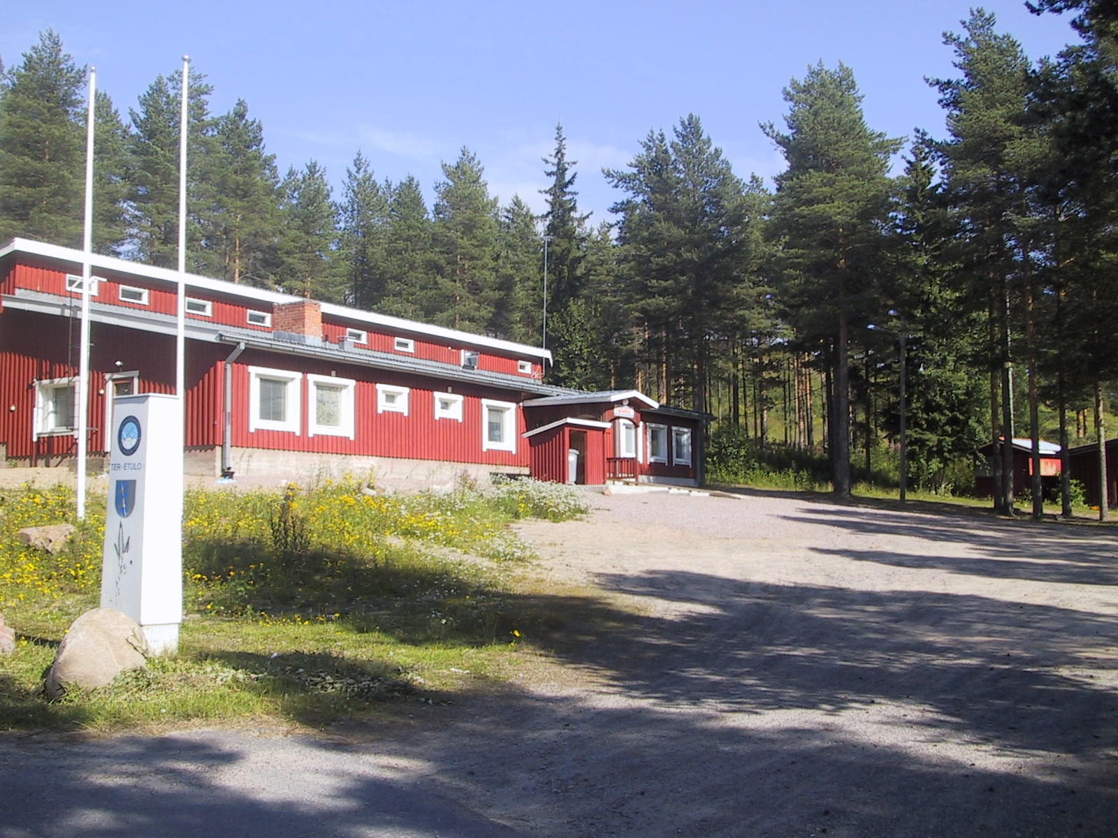 Pyrinnön urheilutalo Kempeleessä.